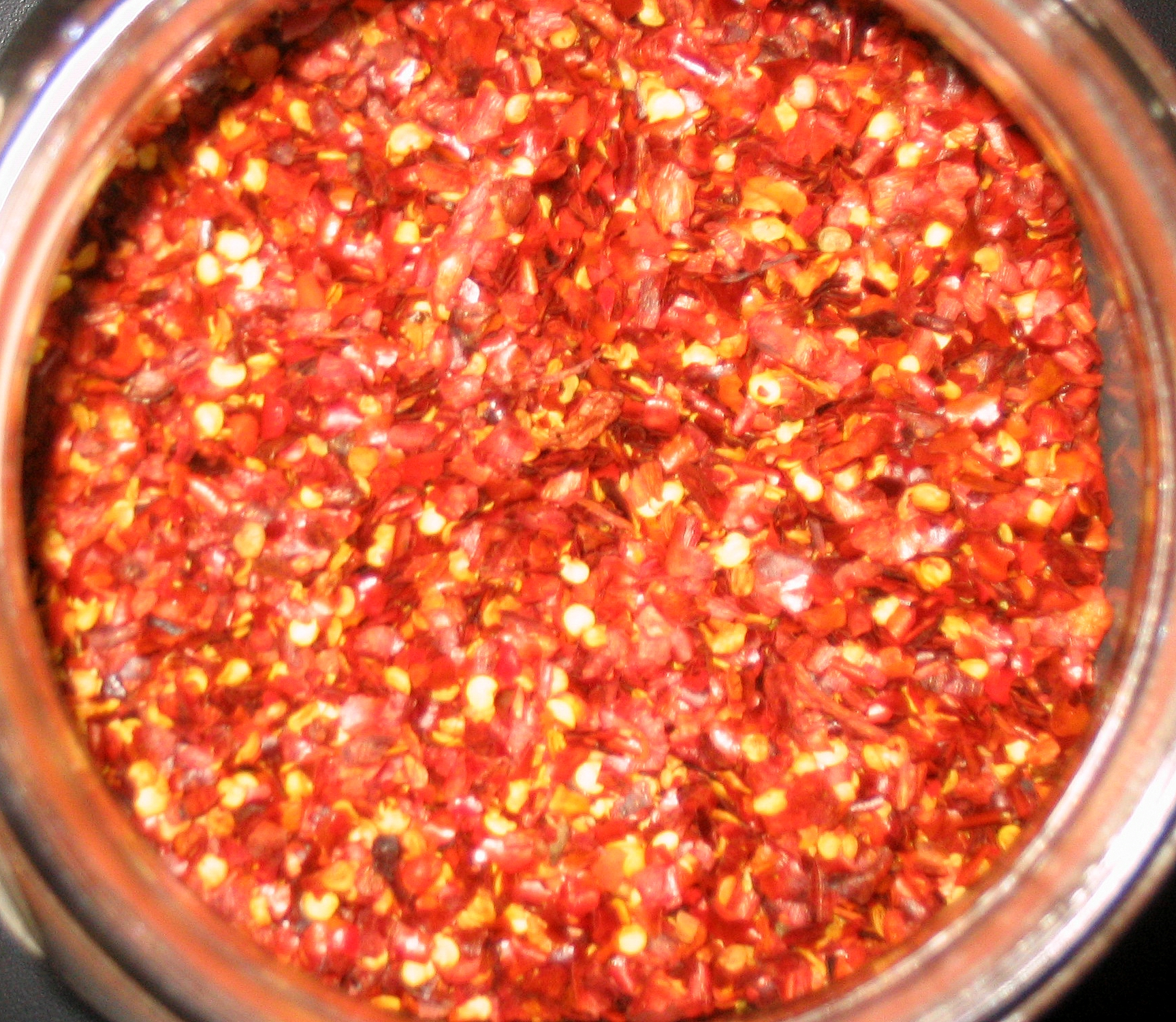 Red pepper flakes